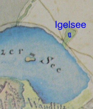 Igelsee auf einem Kartenausschnitt 18. Jh.